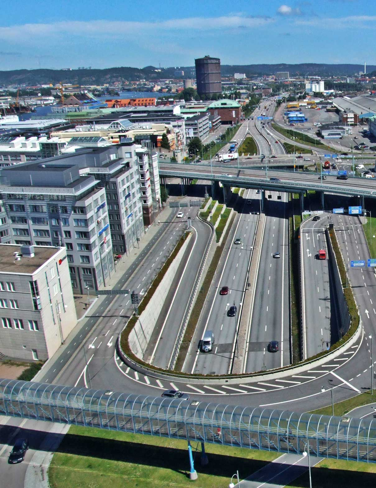 Hultmans holme, sedd från Götatunnelns östra öppning, fotograferad från Göteborgshjulet (nuvarande Lisebergshjulet)